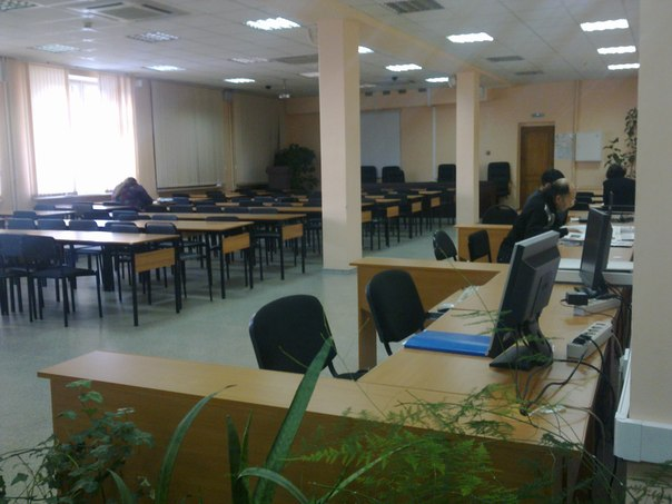 Читальный зал